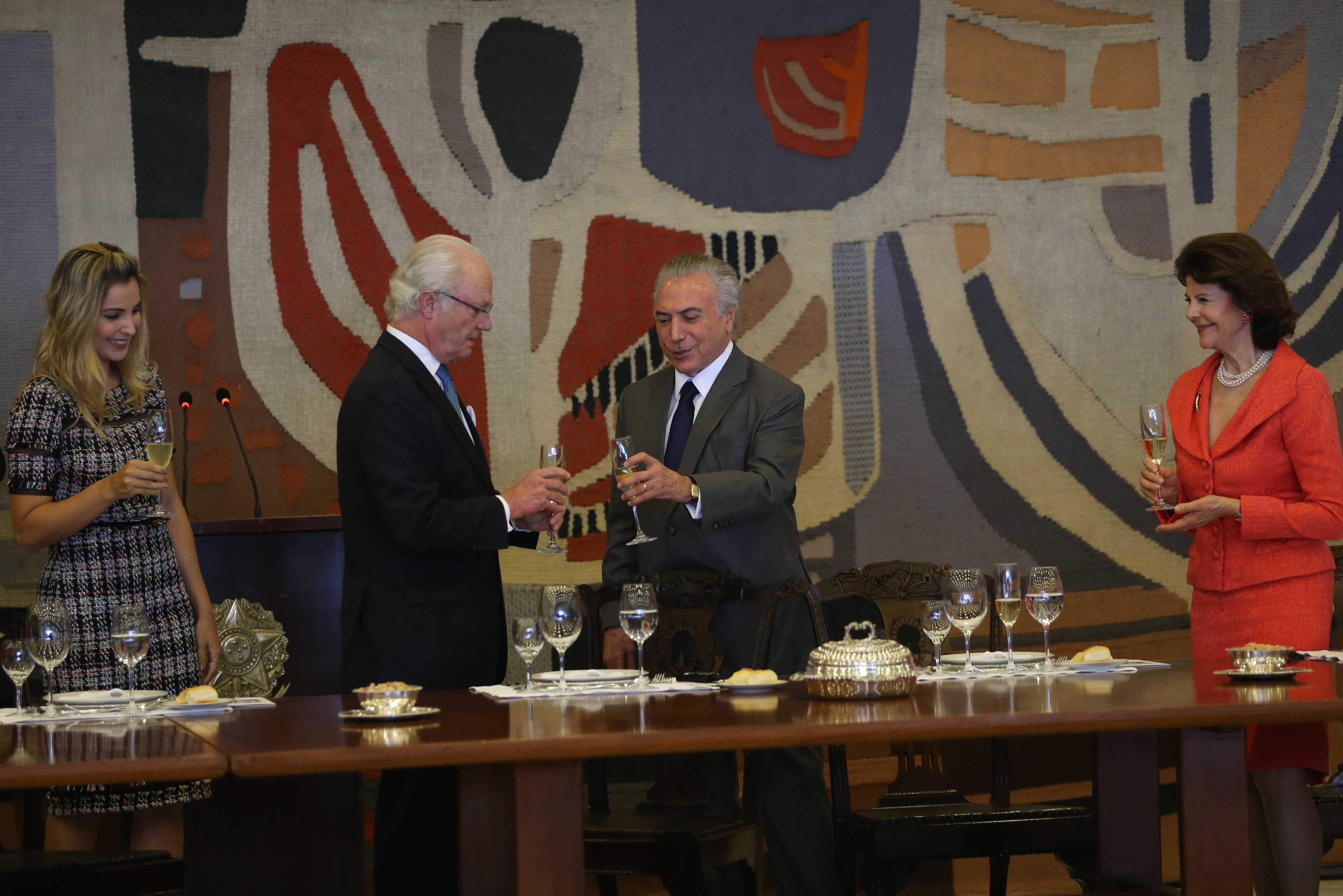 Presidente Michel Temer e a primeira-dama Marcela Temer durante almoço em homenagem aos reis da Suécia, Carlos Gustavo e Sílvia, no Palácio Itamaraty.